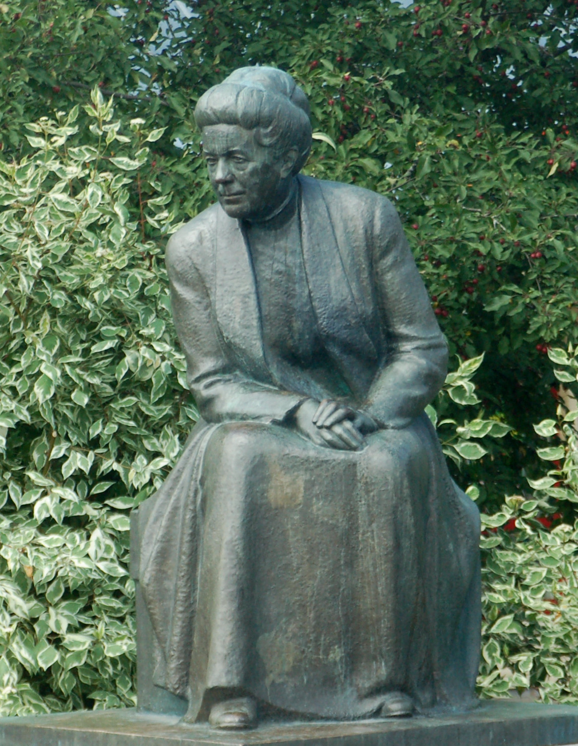 Arvid Backlunds skulptur Selma Lagerlöf placerad i Sunne, Värmland, Sverige, rest 1972